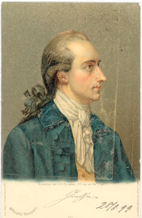 Goethe im Jahr 1779, zwanzig Jahre alt. Postkarte Freies Deutsches Hochstift. Officielle Ausgabe. Kunst-Verlag L. Klement, Frankfurt a.M. Lith. u. Druck v. Joh. Schrodt, Frankfurt a.M. nach der von Eberhard Ege (1868-1932) gemalten Kopie eines Gemäldes von Georg Oswald May.